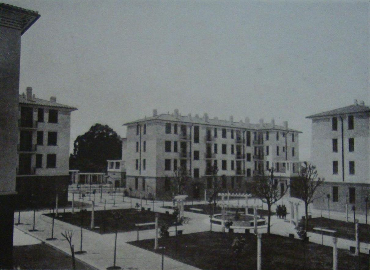 Vista interna de los jardines y la pérgola de la Casa Colectiva Parque Los Andes, un micro barrio construido por la Municipalidad de la Ciudad de Buenos Aires entre 1926 y 1928, en el barrio de Chacarita.